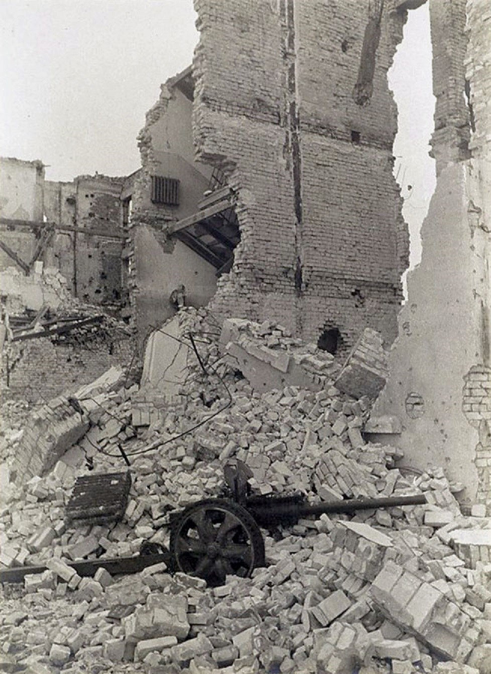 На северной окраине Сталинграда